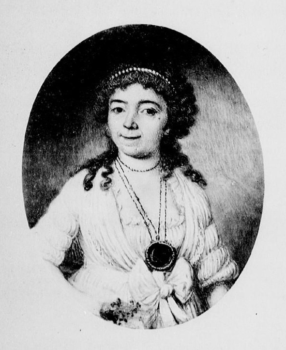 Maréchale Lefebvre (dite Madame Sans-Gêne) Biographies alsaciennes avec portraits en photographie, série 3